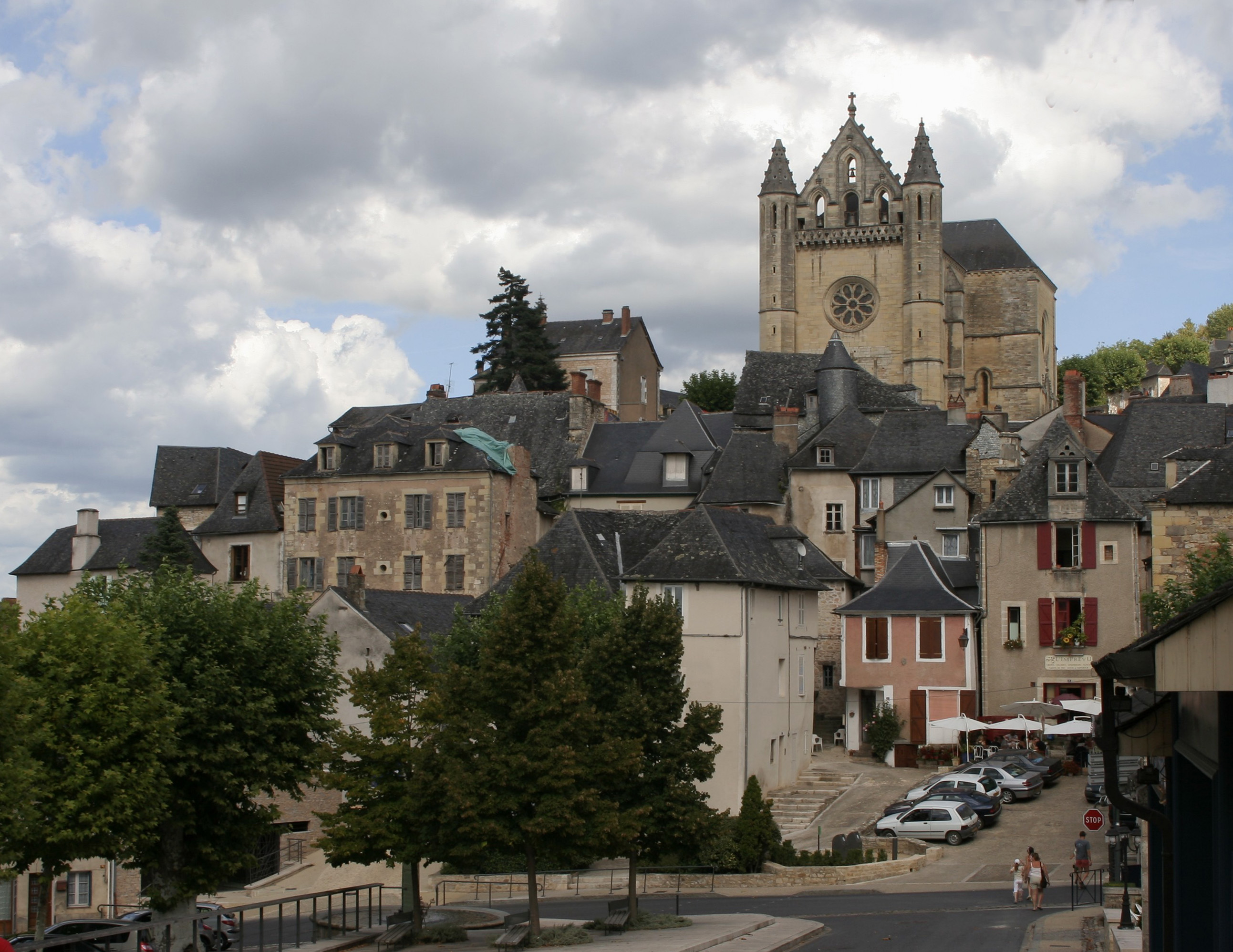 Terrasson